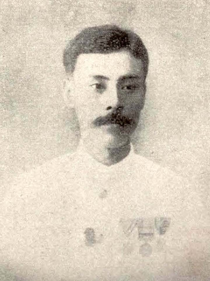 Bân-lâm-gú: 武藤針五郎 Mutō Shingorō (Romaji for 針五郎 is not confirmed)